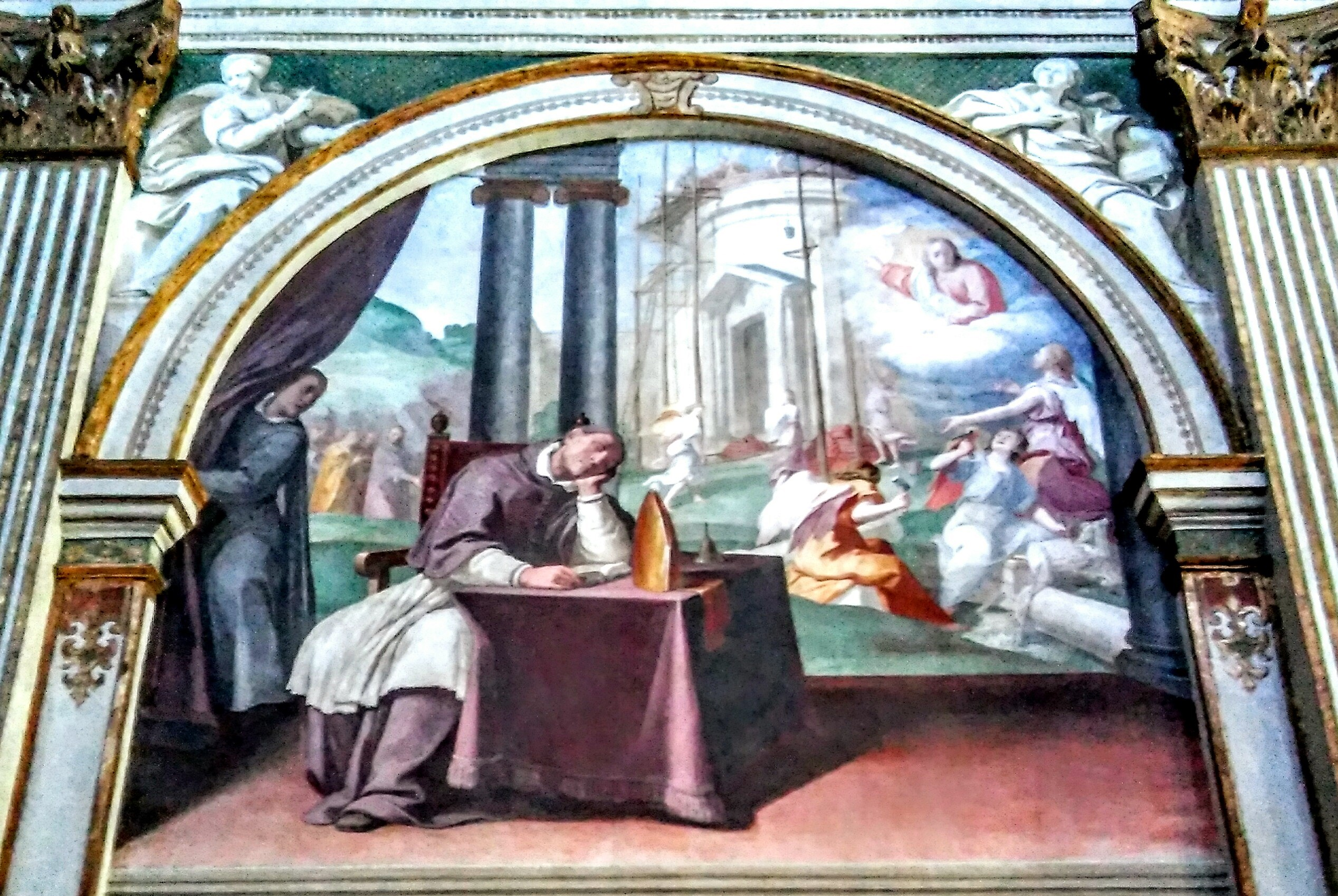 Affreschi nella Certosa di Garegnano: Sogno di Ugo di Grenoble di Daniele Crespi